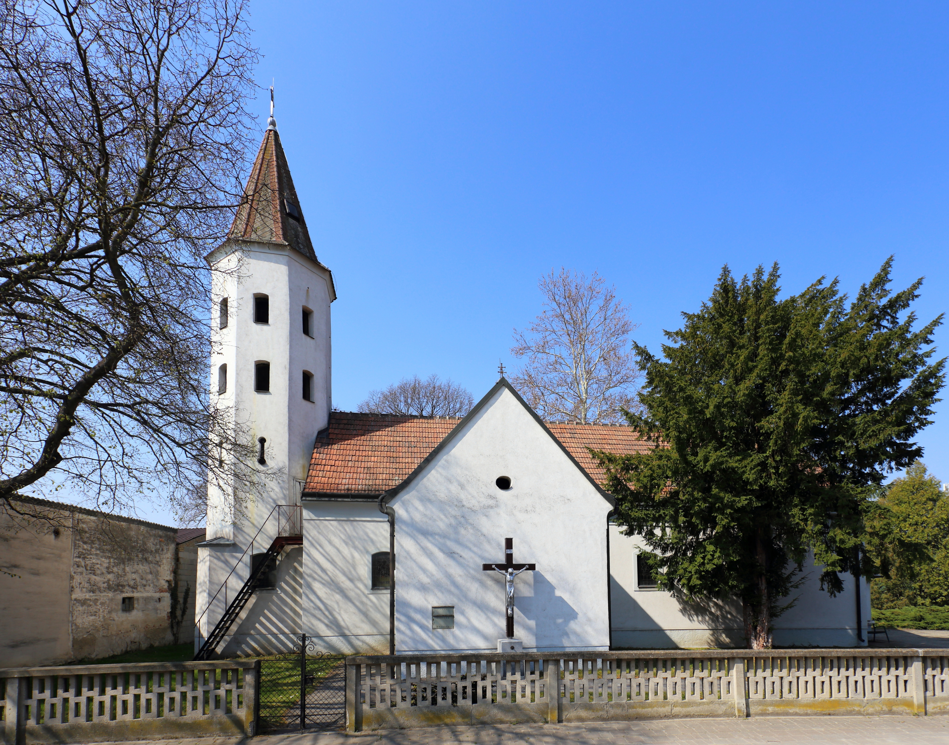 Filialkirche hl. Franz Xaver in der niederösterreichischen Gemeinde Mannsdorf an der Donau. Eine schlichte Dorfkirche im Nordosten des Ortes. Ursprünglich ein barocker Bau aus dem Jahr 1769, der von 1955 bis 1957 erweitert und umgebaut wurde.